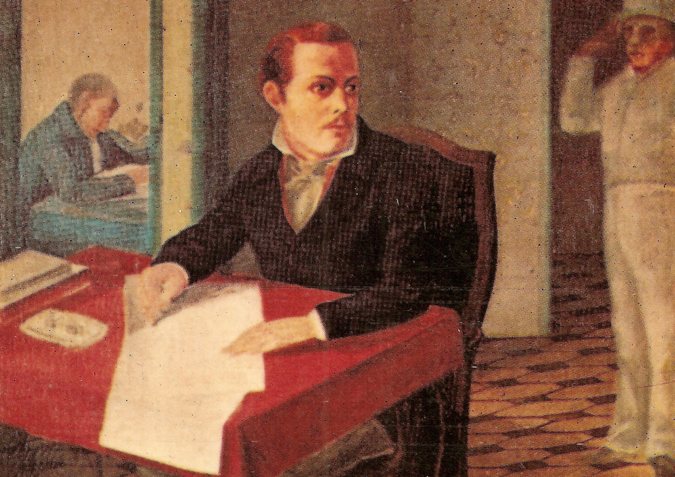 Juan Lovera: Retrato de Antonio Muños Tebar. (c.1813). Óleo sobre tela 97x76,5 cm. Coleción Casa natal del Libertador. Caracas - Venezuela